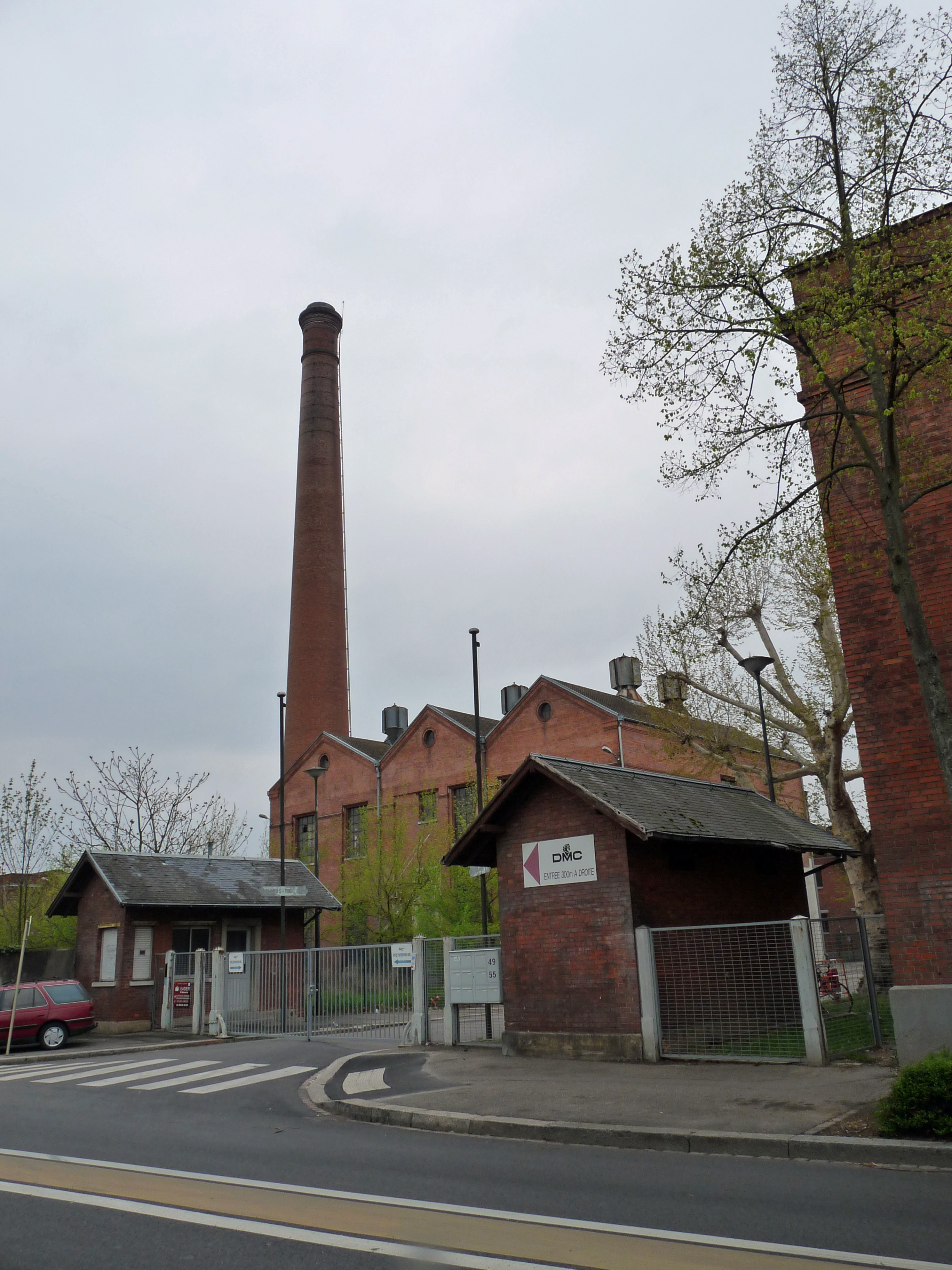 Mulhouse (Haut-Rhin) : site de la société DMC (filature), en cours de réaménagement